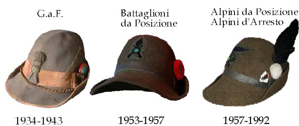 evoluzione